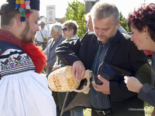 František Zemek: Aj hejtmanova pravá ruka plní skleničku, vzdávajíc tak dík, půdě, potu a slováckému sluníčku